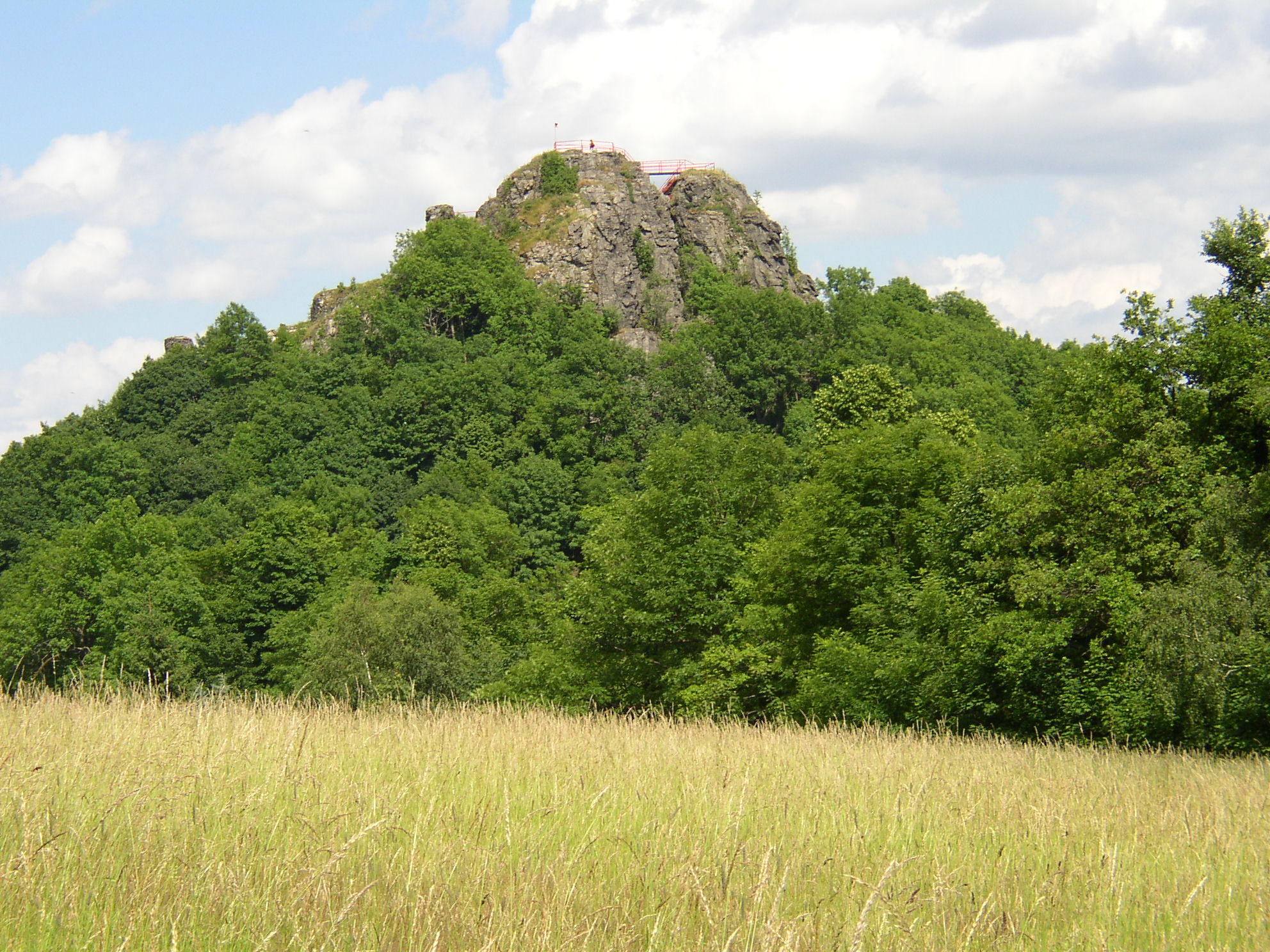 Hrad Tolštejn ze západu